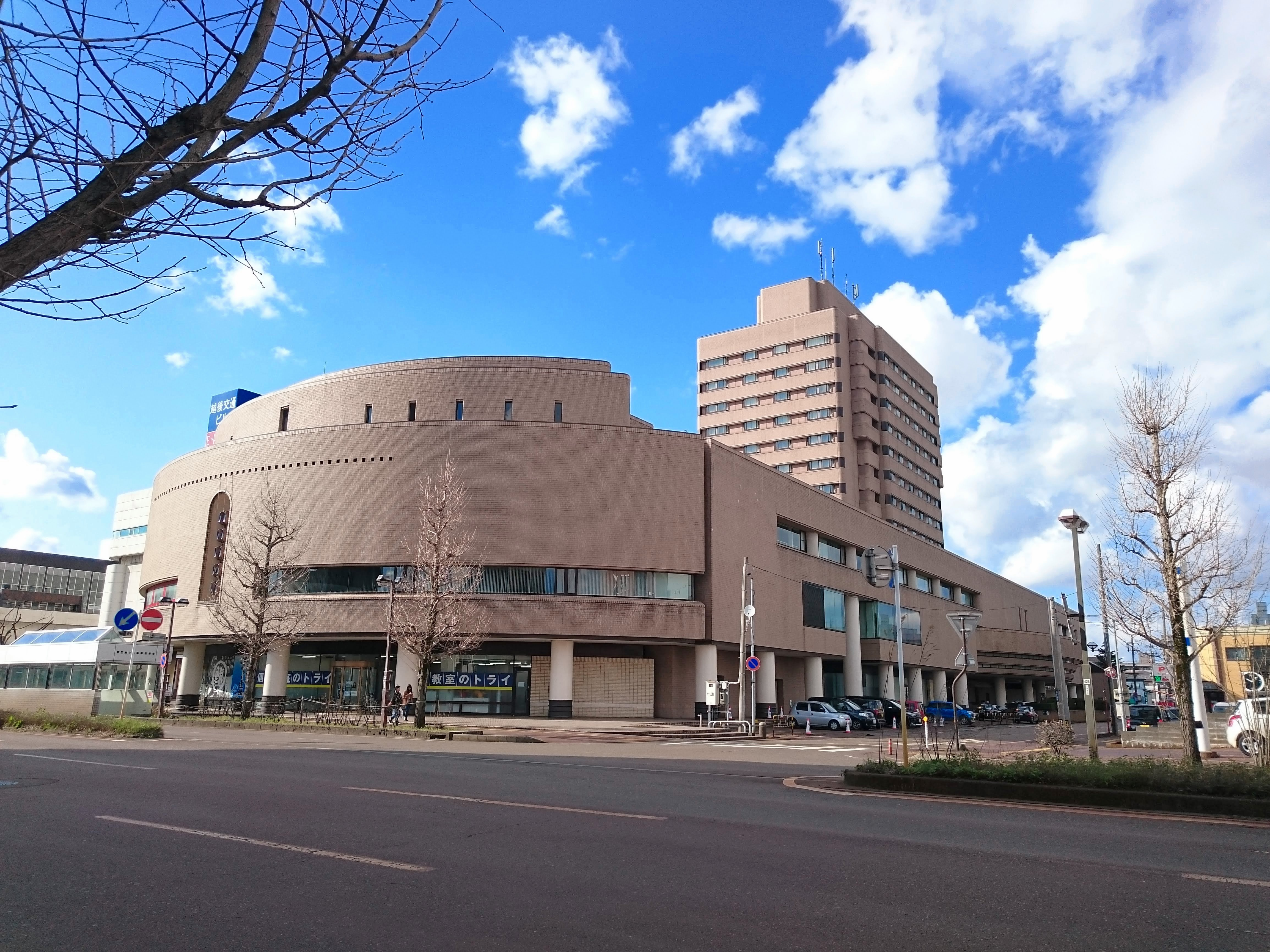 ホテルニューオータニ長岡の建物外観（全景）